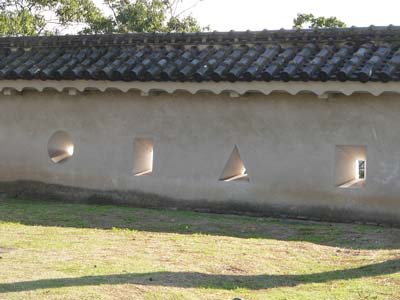 Los sama del castillo Himeji